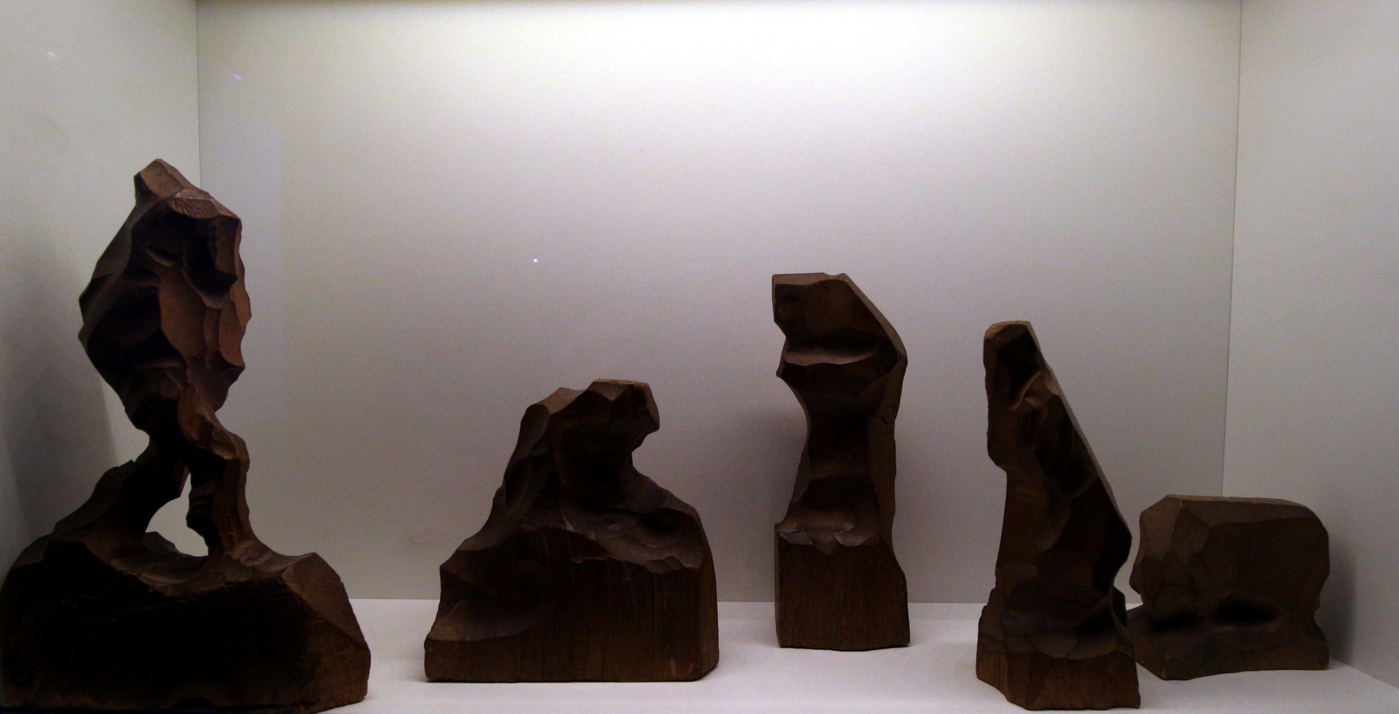 Figuren von Ludwig Penz, um 1900, im Tiroler Volkskunstmuseum.